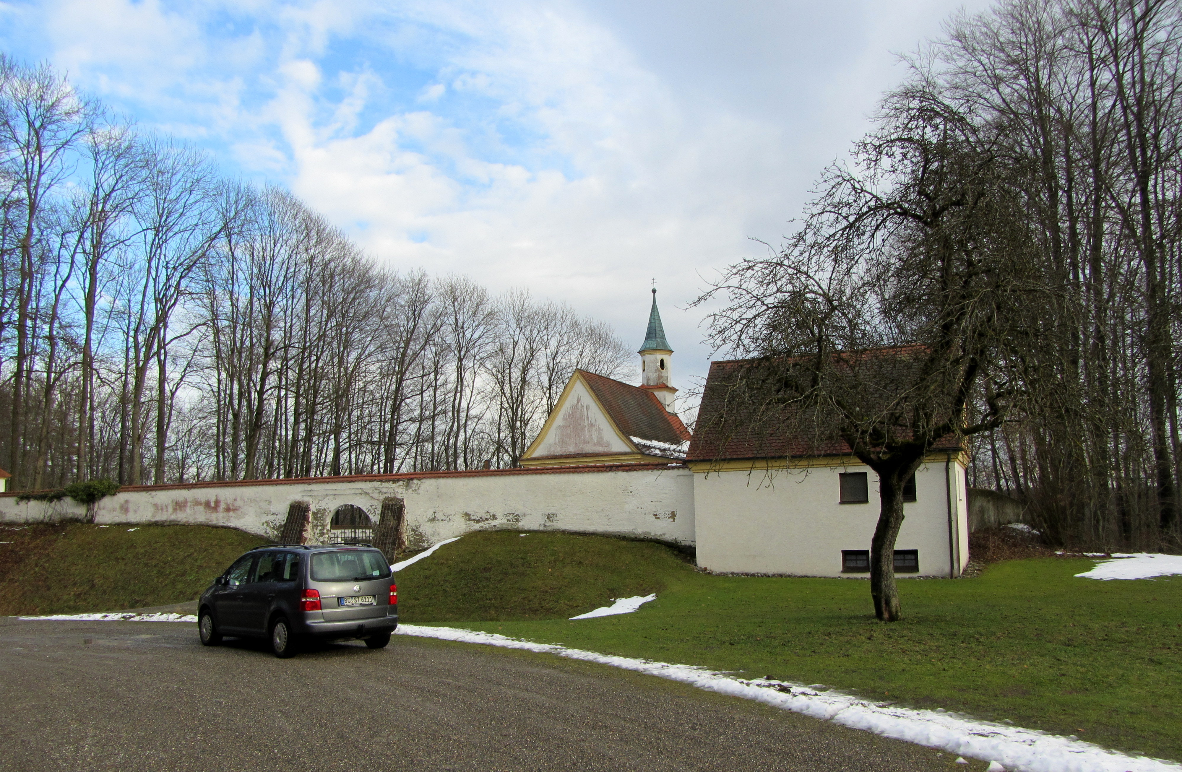 Gottesackerkapelle (Gutenzell)- Kriegerdenkmal 1. Weltkrieg